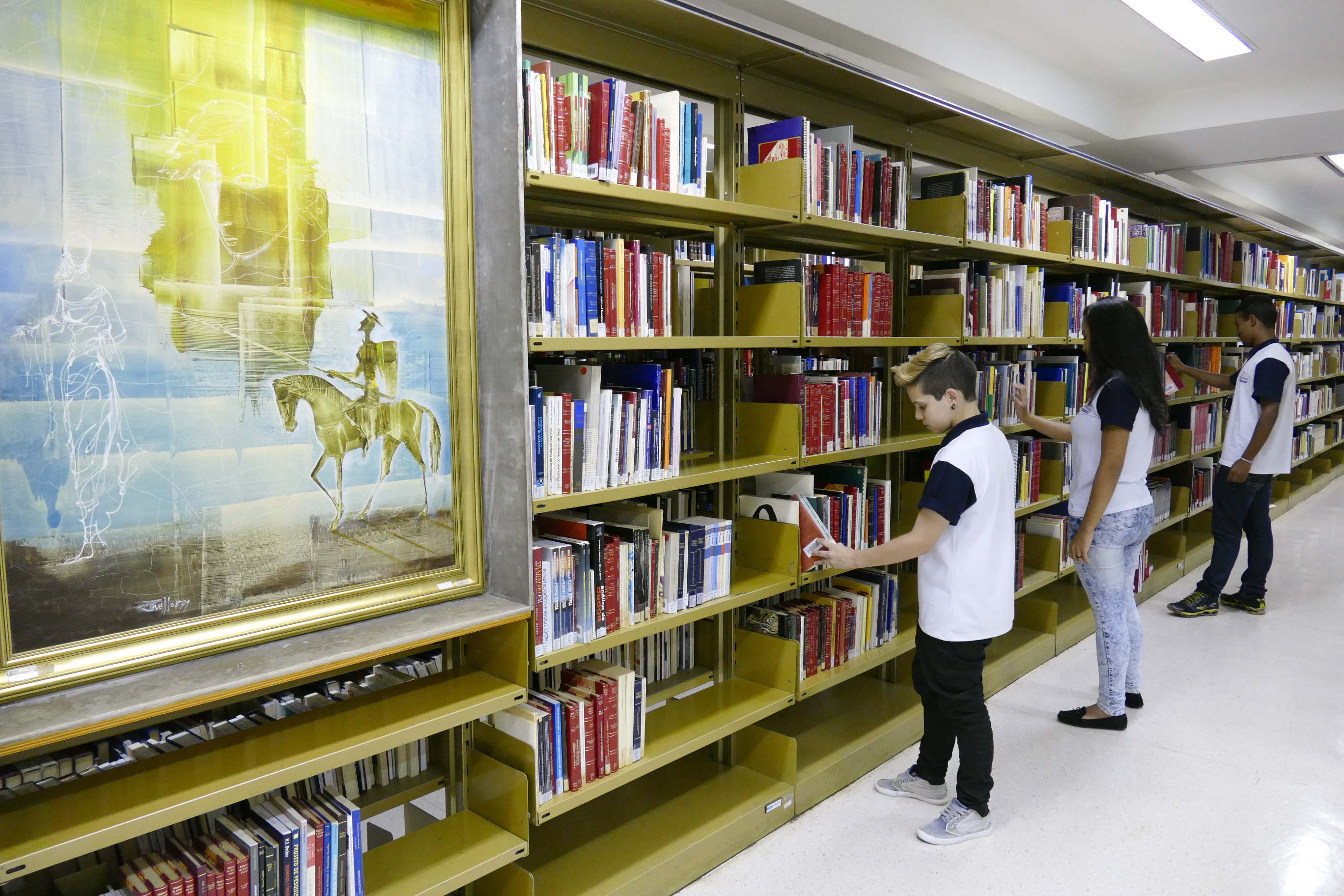 Iniciativa criada pelo Senado Federal em 2014, o Jovem Aprendiz busca contribuir na formação profissional de adolescentes entre 14 e 17 anos da rede pública de ensino do Distrito Federal. Os estudantes atuam em áreas administrativas da Casa, tendo a oportunidade de entrar em contato com o mercado de trabalho. A Biblioteca do Senado Federal é um dos setores em que trabalham os adolescentes beneficiados pelo programa que contribui para inclusão social de jovens de baixa renda. Foto: Roque de Sá/Agência Senado